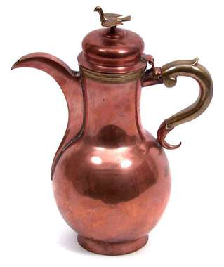 Kaffekanne av kobber med hank, beslag og fugl på lokket av messing. Kannen er trolig laget på midten av 1700-tallet, og det er nærliggende å tro at det er en gullsmed som står bak en slik elegangt form. Høyde 28 cm. Foto Anne-Lise Reinsfelt, Norsk Folkemuseum, NF.1902-0537.